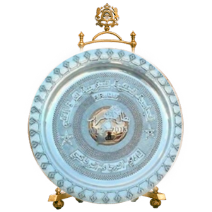 2013 البطولة المغربية الإحترافية